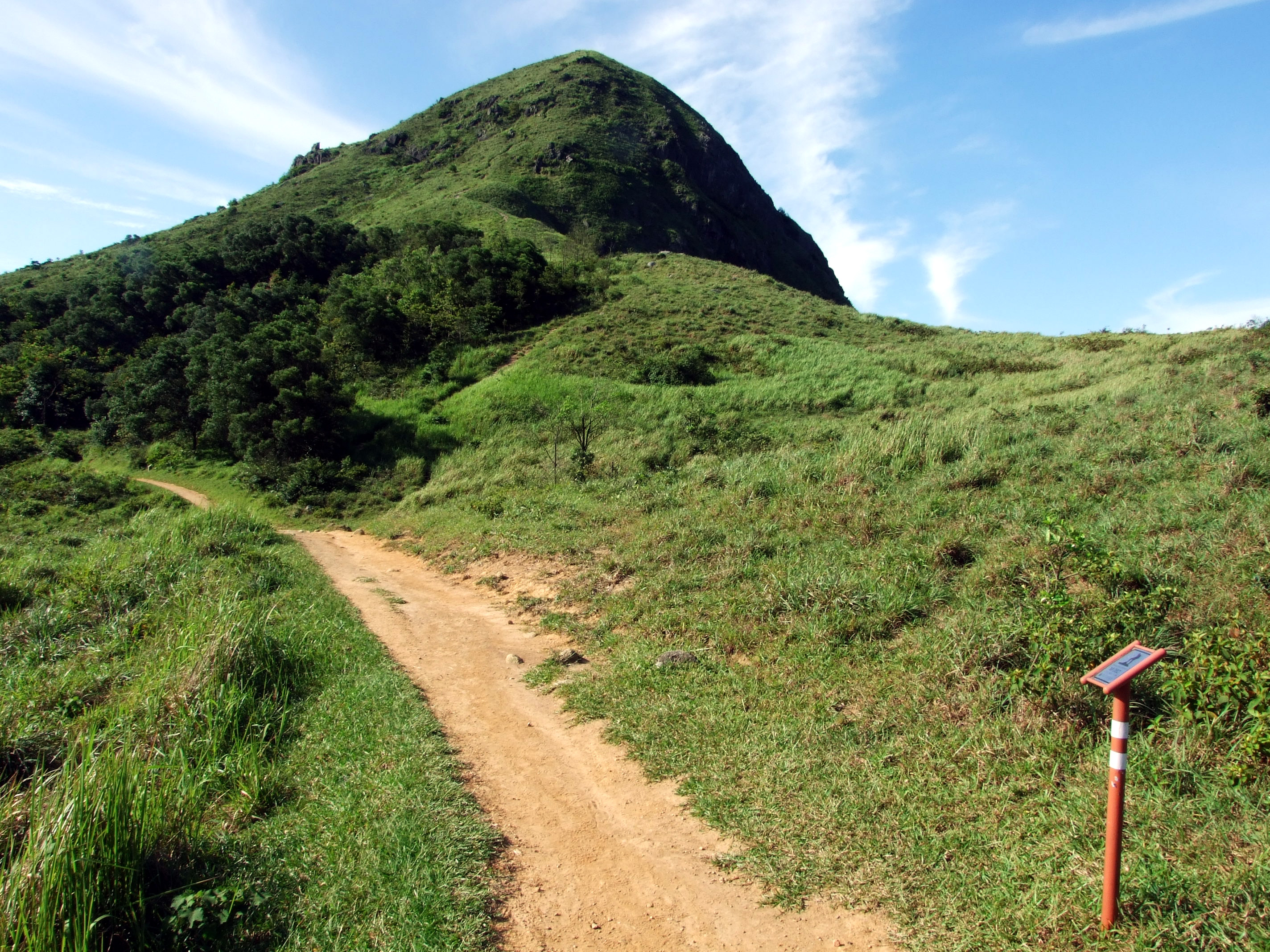 中文（香港）: 大金鐘